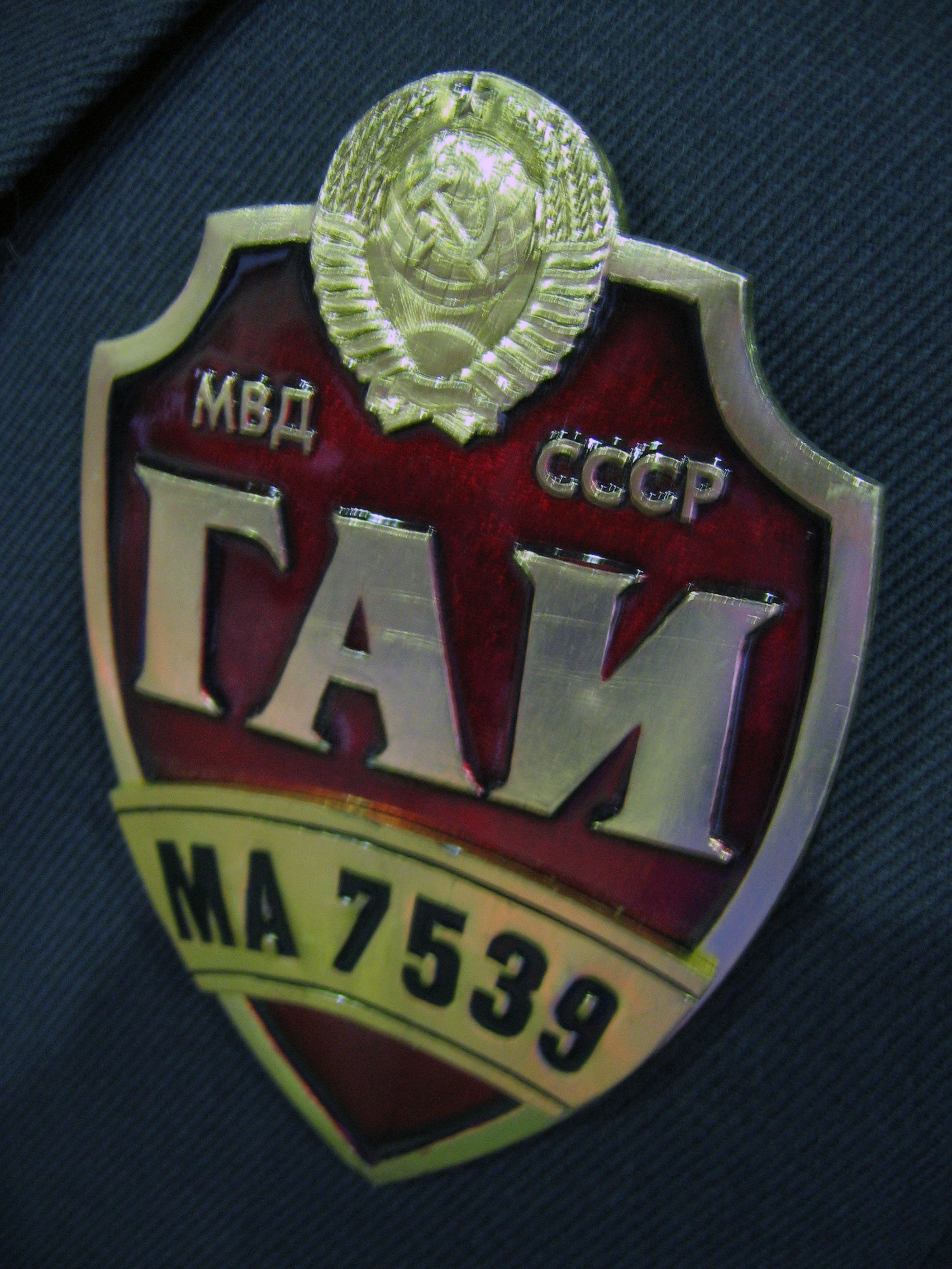 Нагрудный знак инспектора ГАИ МВД СССР.